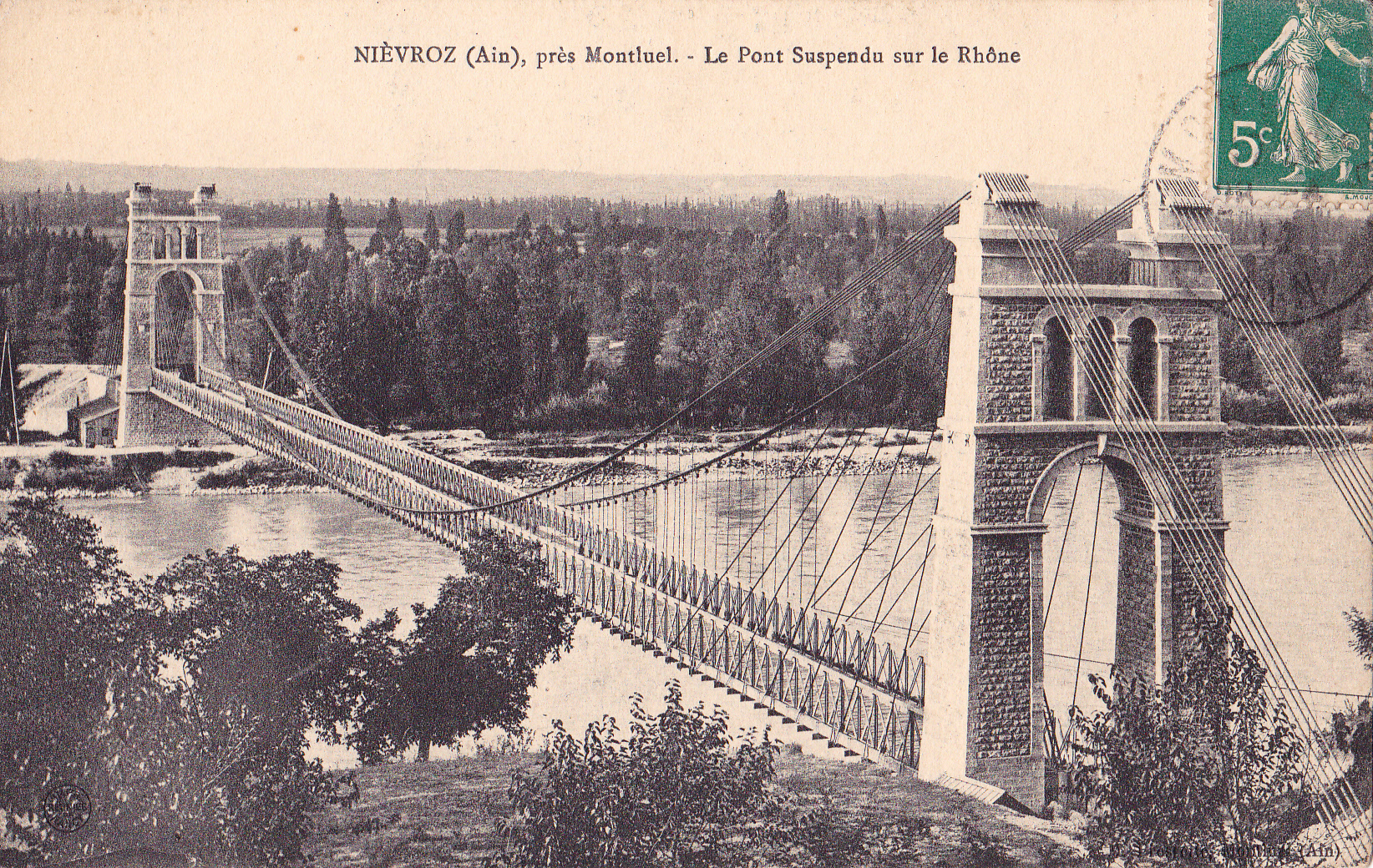 Pont supendu de Jons (détruit). La photo est prise depuis la rive, côté Jons (voir géolocalisation présumée).